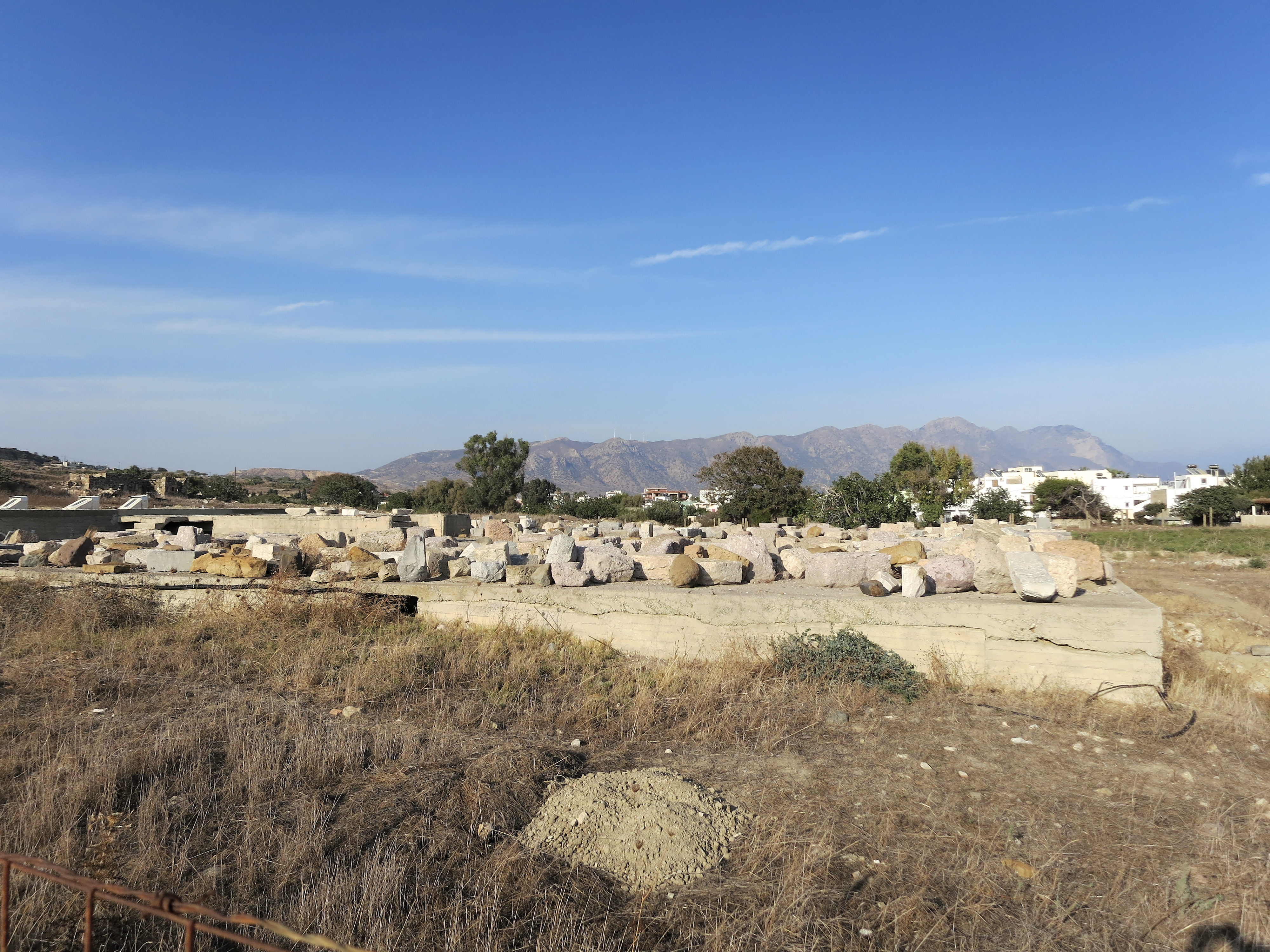 Die Ruinen des antiken Alasarna